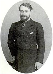 Henri Matisse Portraitfoto 1898, zur Zeit seiner Hochzeit mit Amélie Parayre